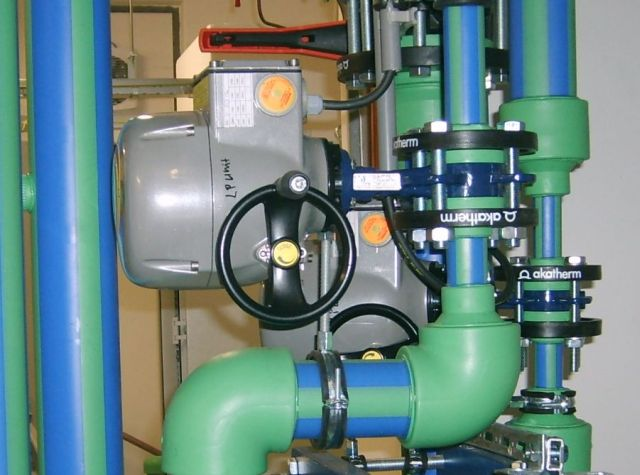 butterfly valve with electrical actuator